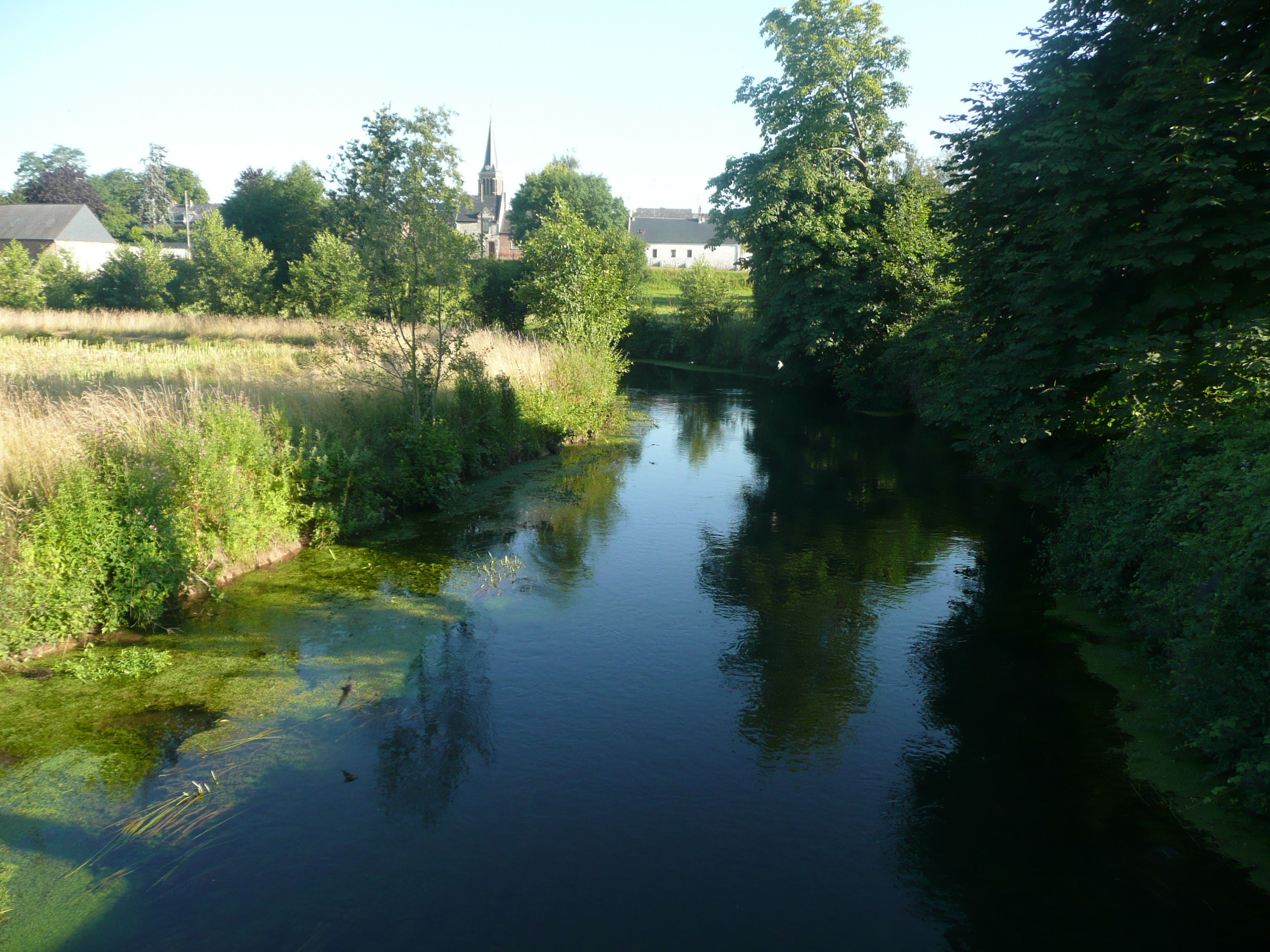 Photos de la souche, vue du pont, entrée du village